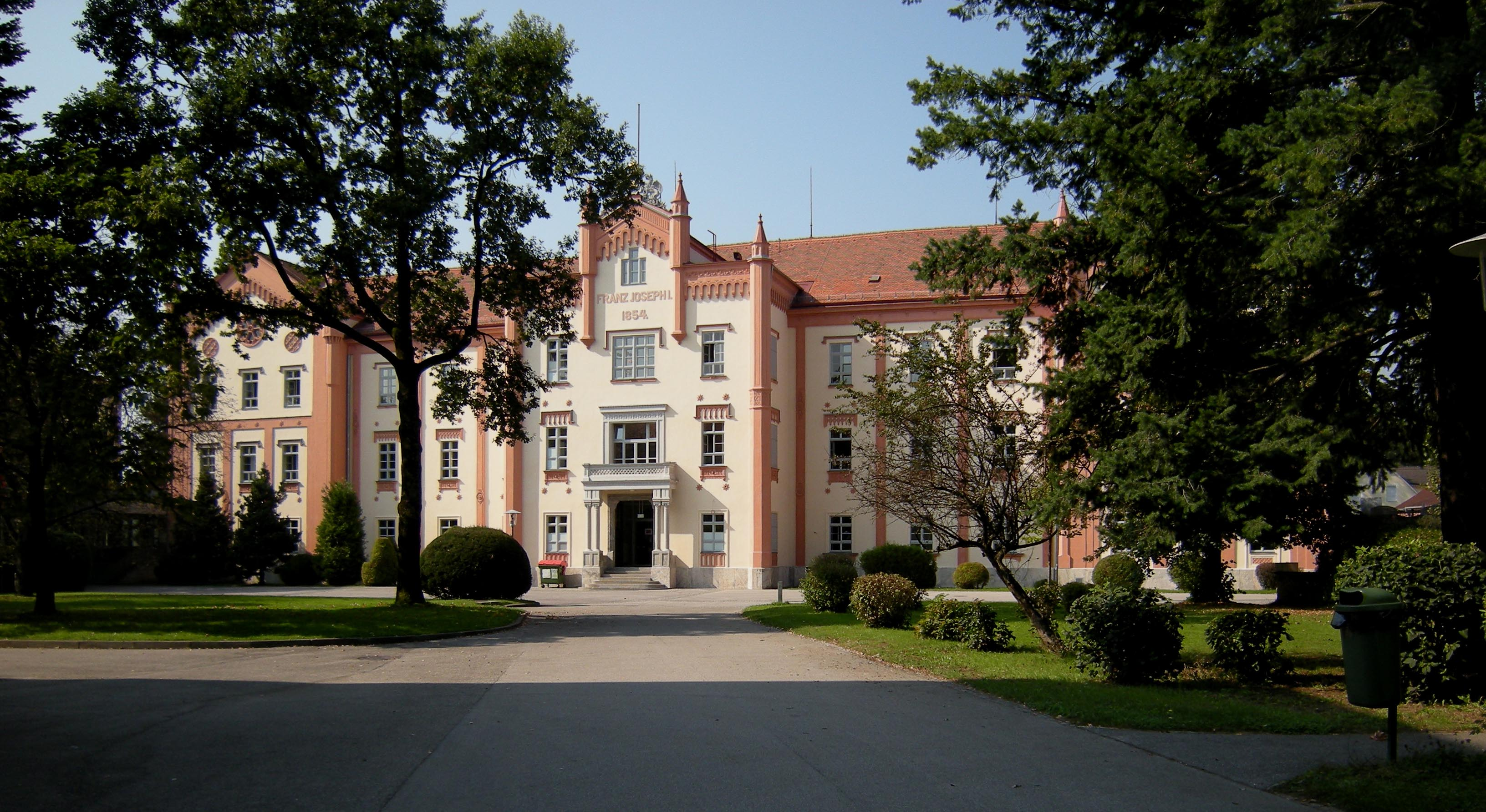 BG-BORG_HIB_Graz_Liebenau